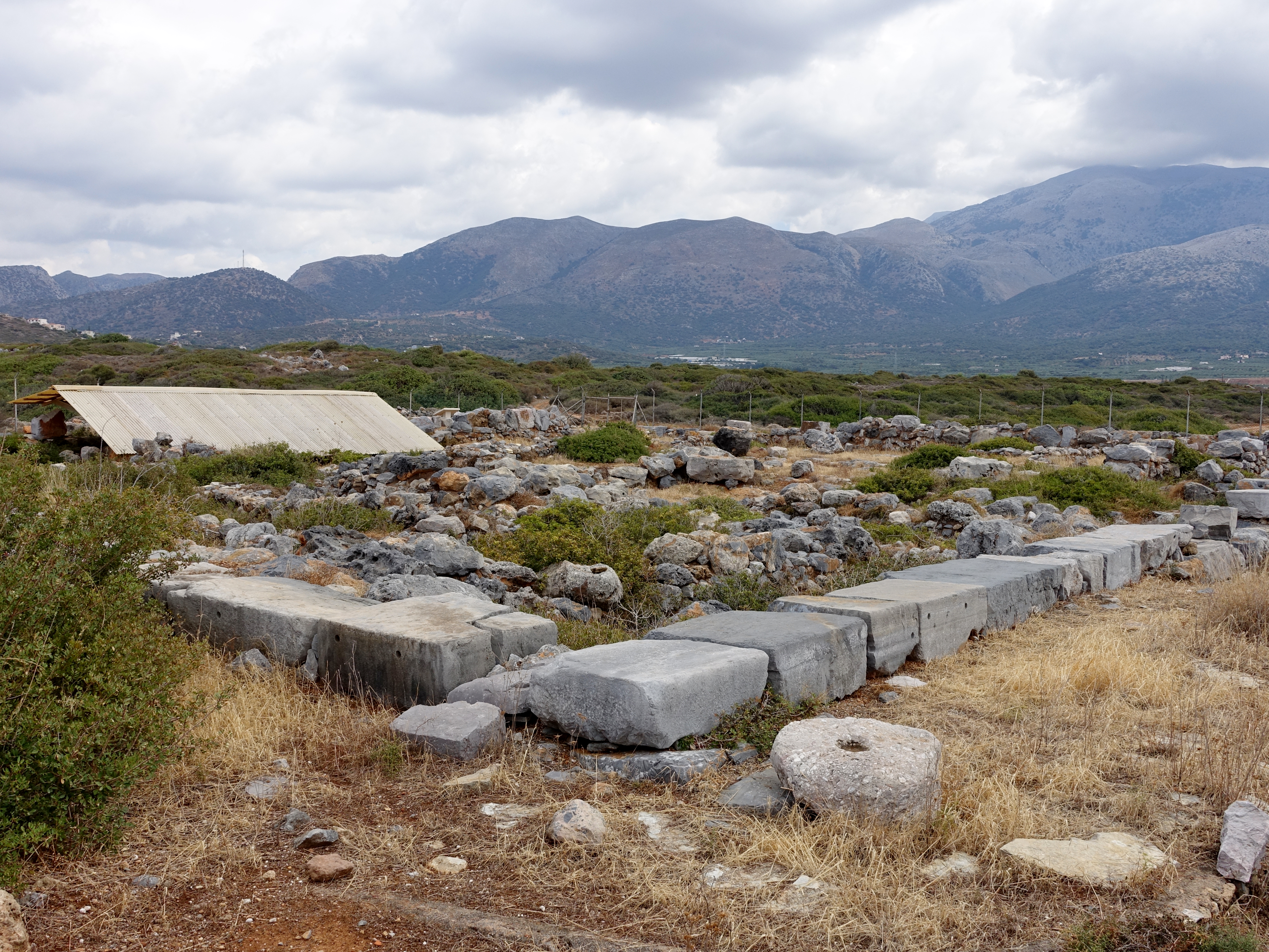 Ausgrabungsstätte von Chrysolakkos (Χρυσόλακκος), Gemeinde Chersonisos, Kreta, Griechenland